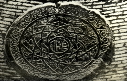 Mömünəxatun türbəsində medalyon